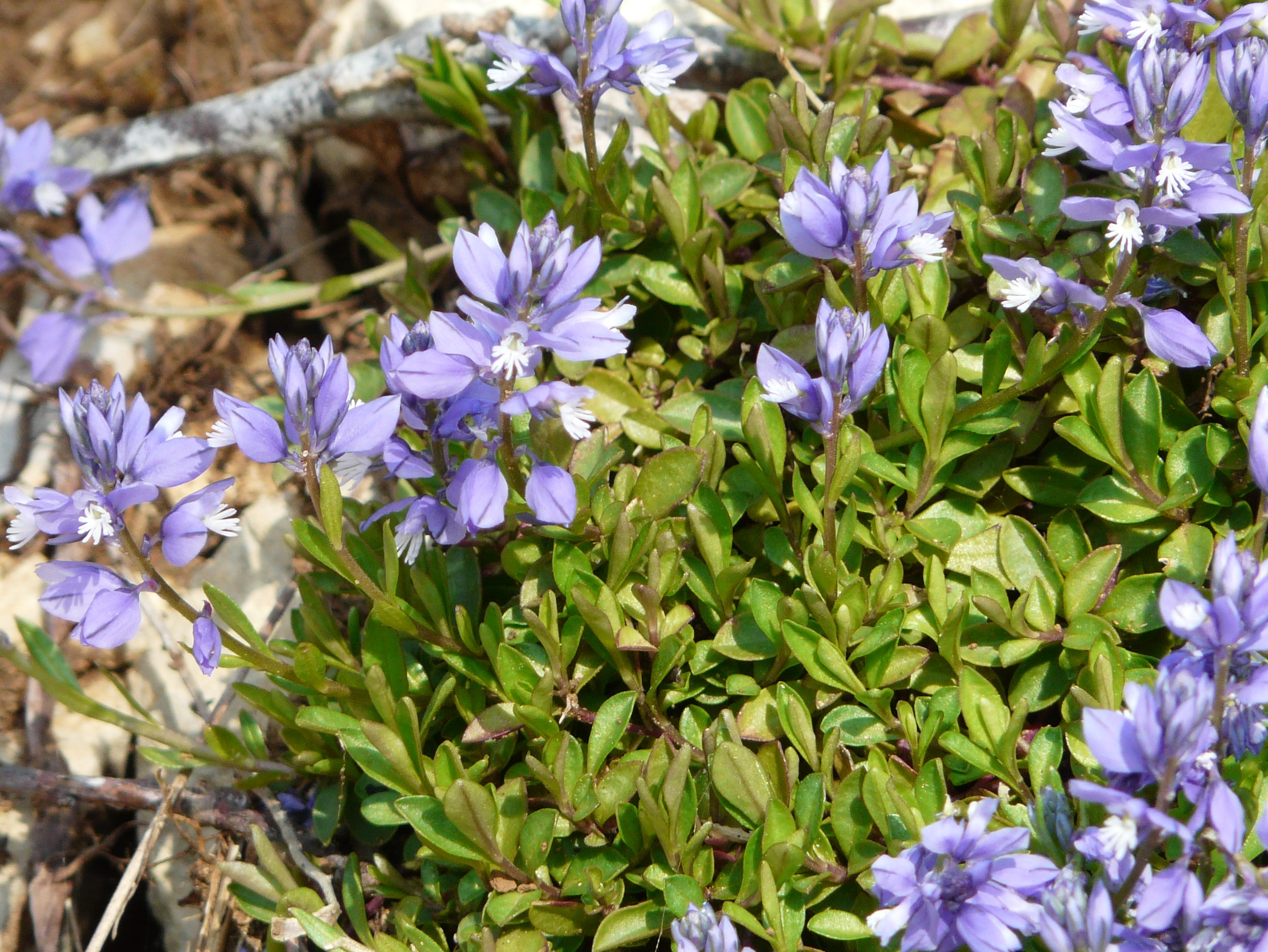 Polygala calcarea, La Cassagne, Dordogne, France